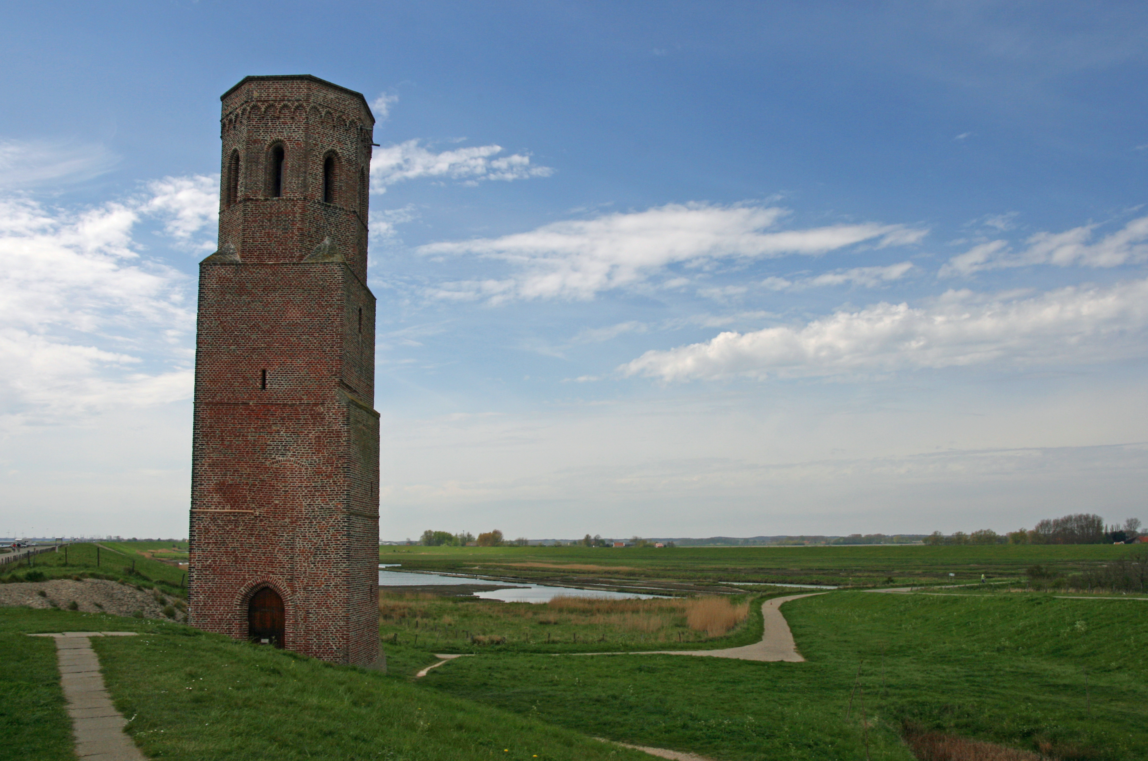 Plompetoren: eenzaam en alleen